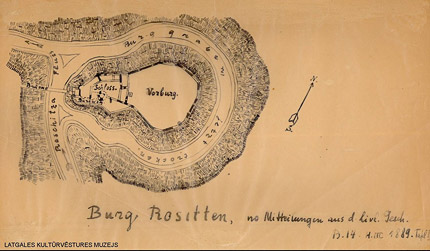 Räisaku plaan 1889